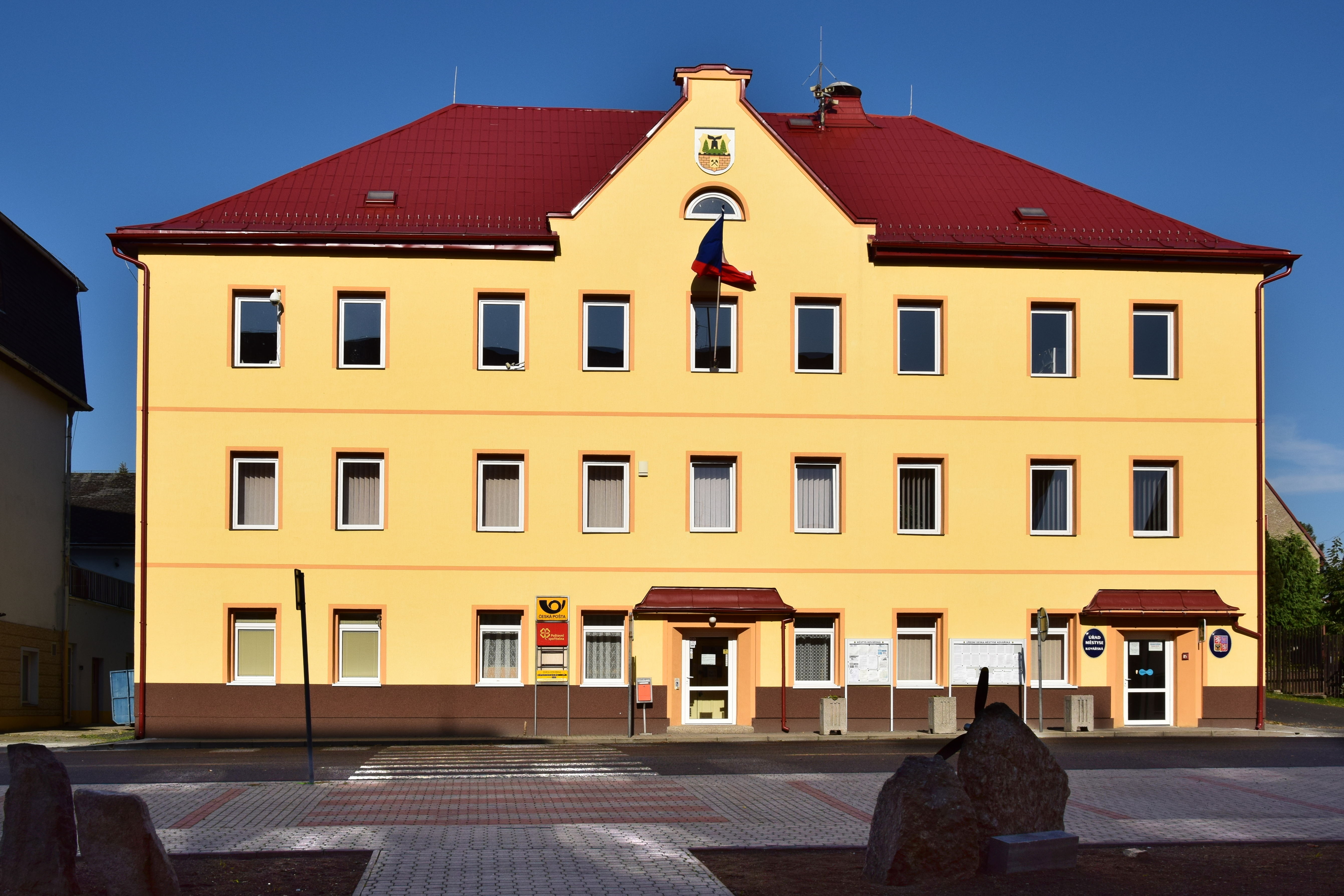 Kovářská – obecní úřad